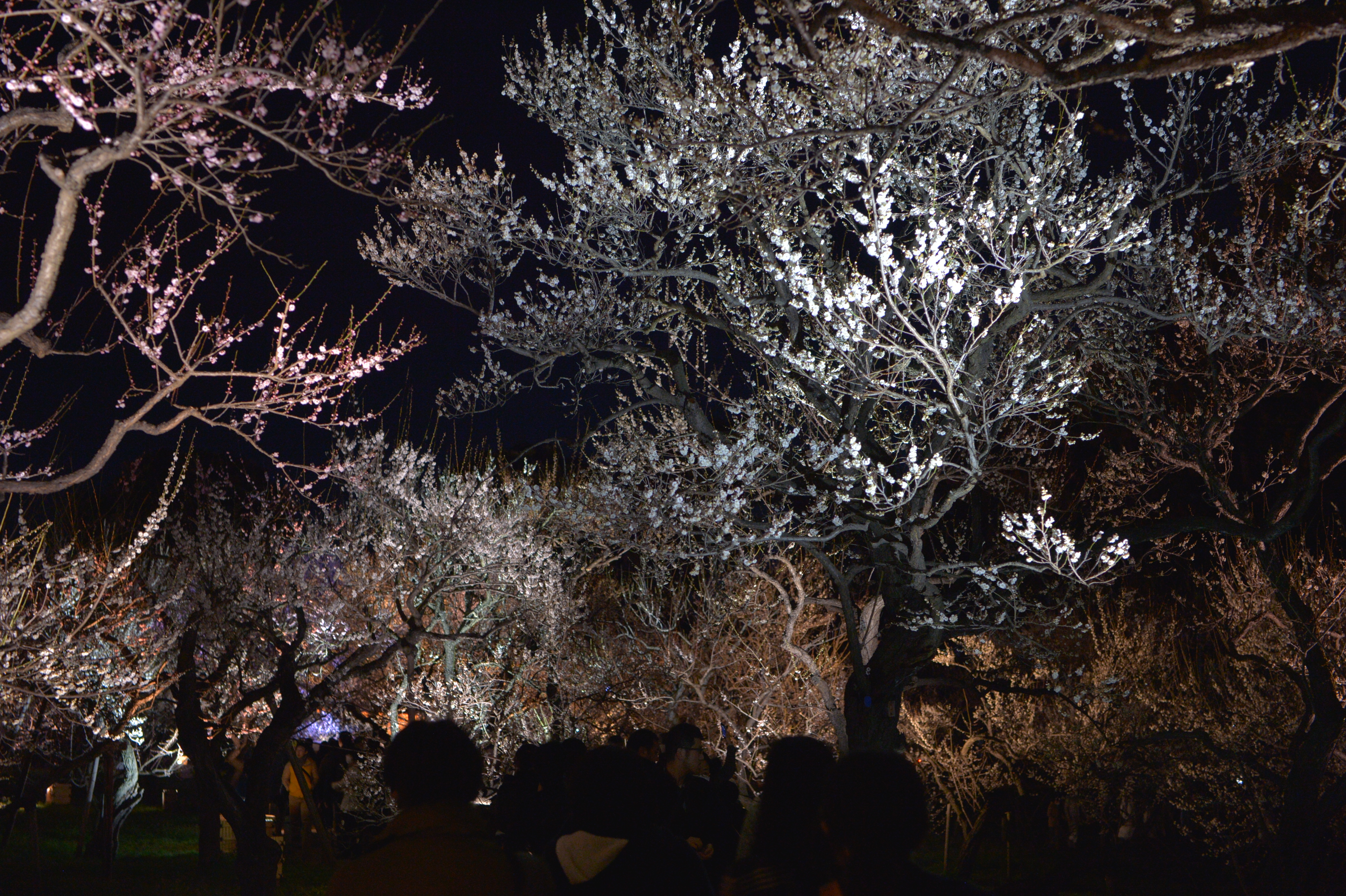 2019年・夜梅祭 第二夜（偕楽園）園内のライトアップされた梅林 Nikon Df